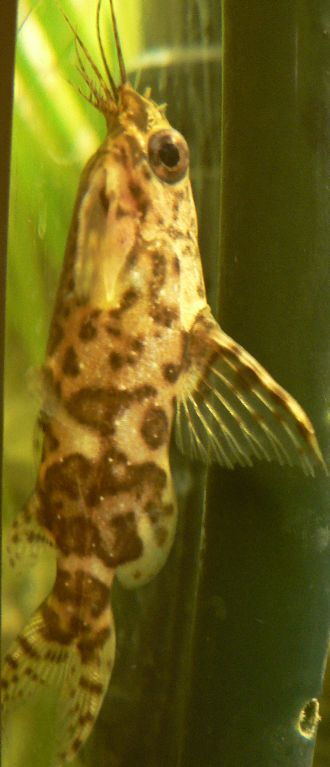 es handelt sich um den Rückenschwimmenden Kongowels, in meinem eigenem Aquarium. Das Tier ist etwa 6cm groß.